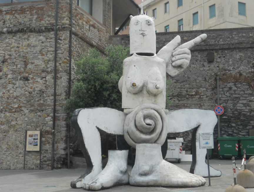 Gigantesco totem realizzato per gli Uccelli di Aristofane.